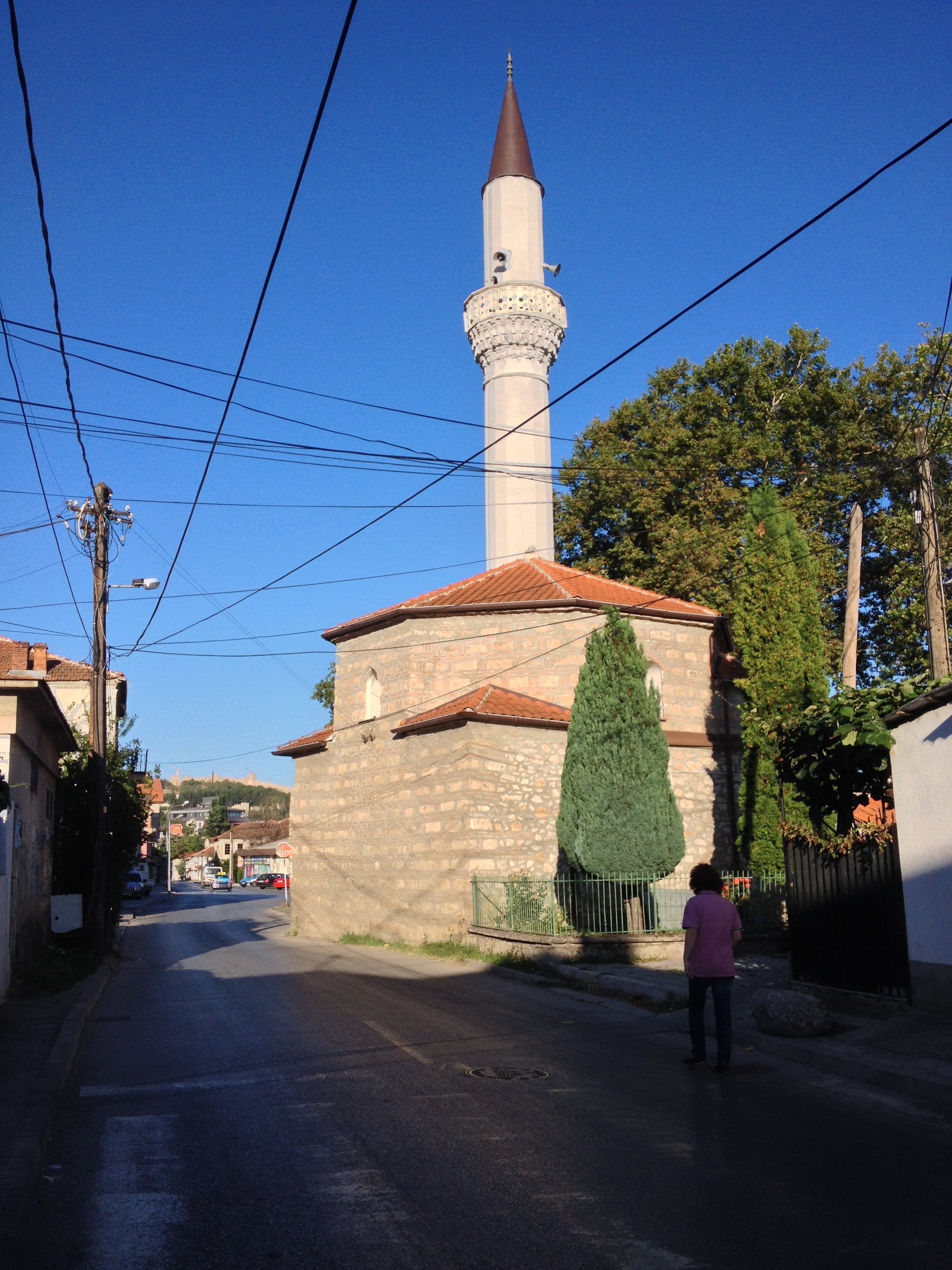 Die Hadschi-Durgut-Moschee in Ohrid, Mazedonien